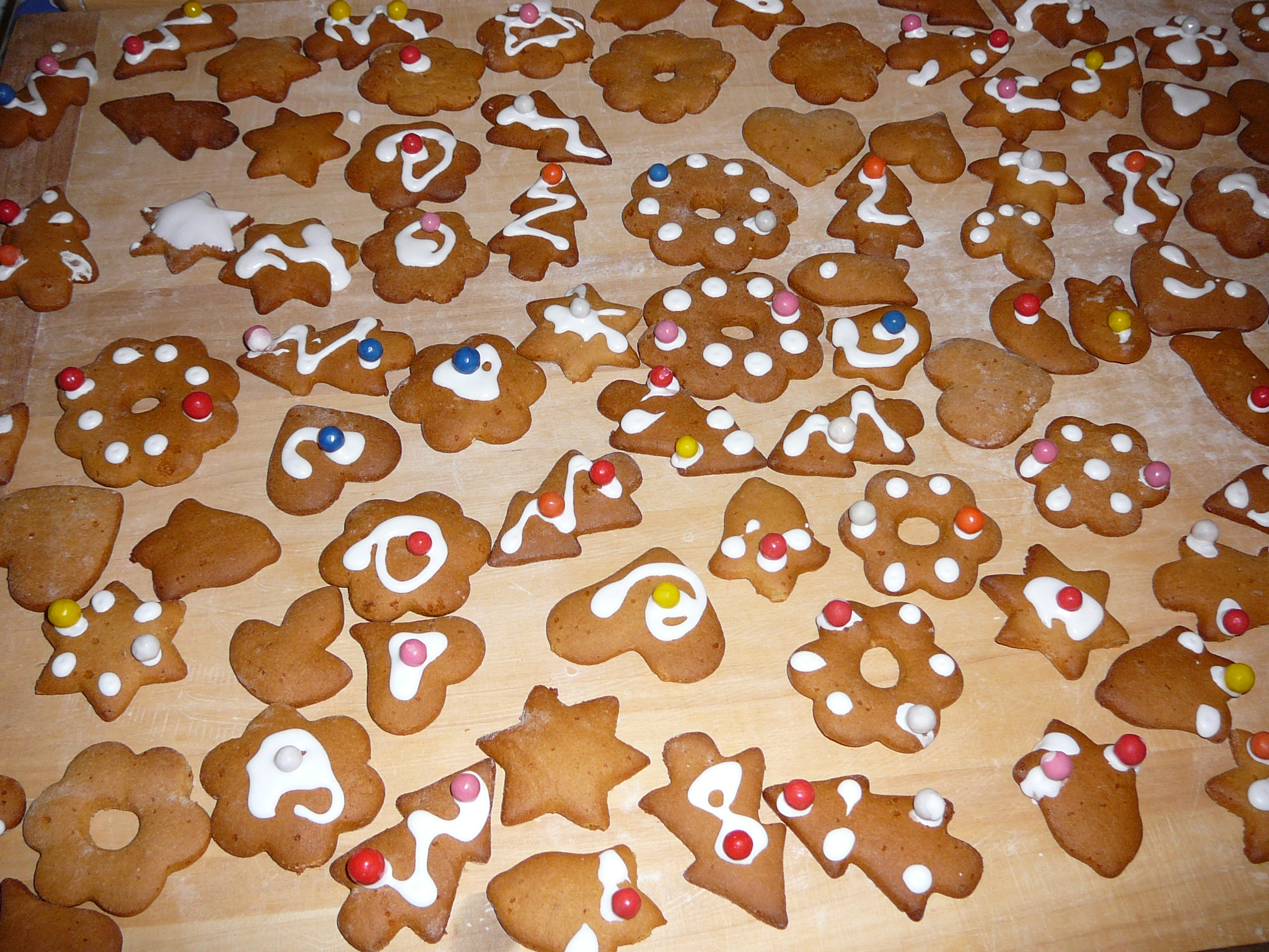 Karácsonyi mézeskalácsok tojáshab- és franciadrazsé-díszítéssel